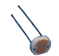 Las fotoresistencias reducen su resistencia eléctrica (Ohms) al estar expuestas a una intensidad de luz elevada, aumentan la resistencia en presencia de obscuridad.